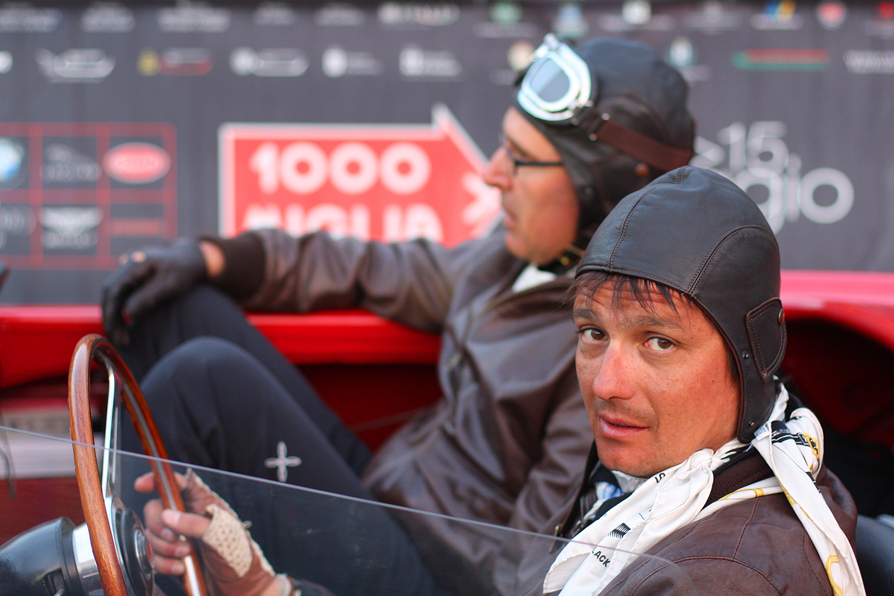 Mille Miglia 2011